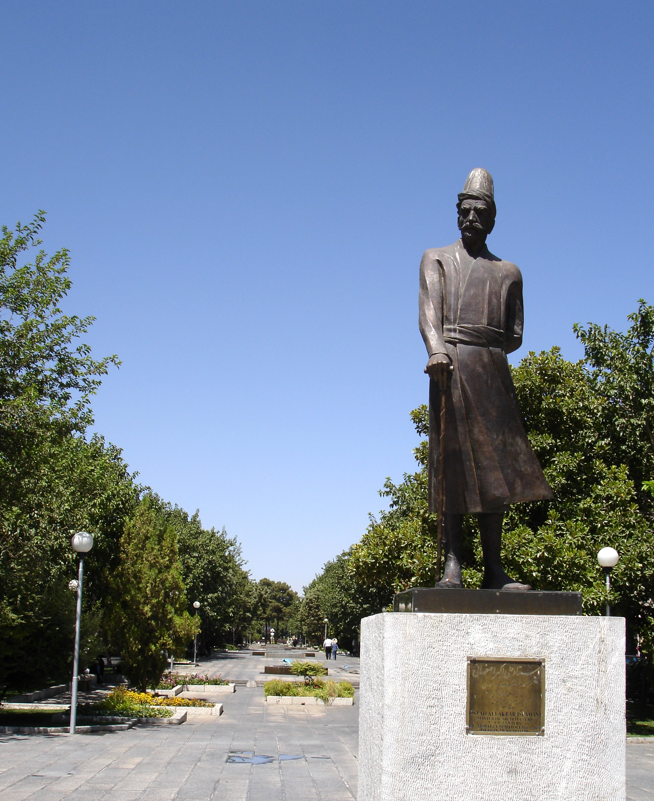 مجسمه استاد علی اکبر اصفهانی در خیابانی در اصفهان